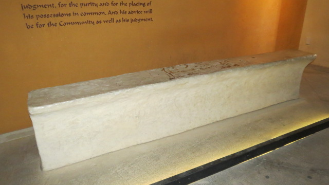 Qumran, Dead Sea, Palestine Qumran Caves where the Dead Sea Scrolls קומראן